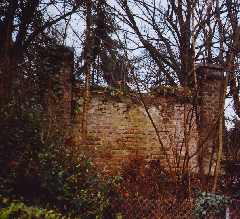 Stück_alte_Friedhofsmauer des Burtscheider Heißbergfriedhofs.